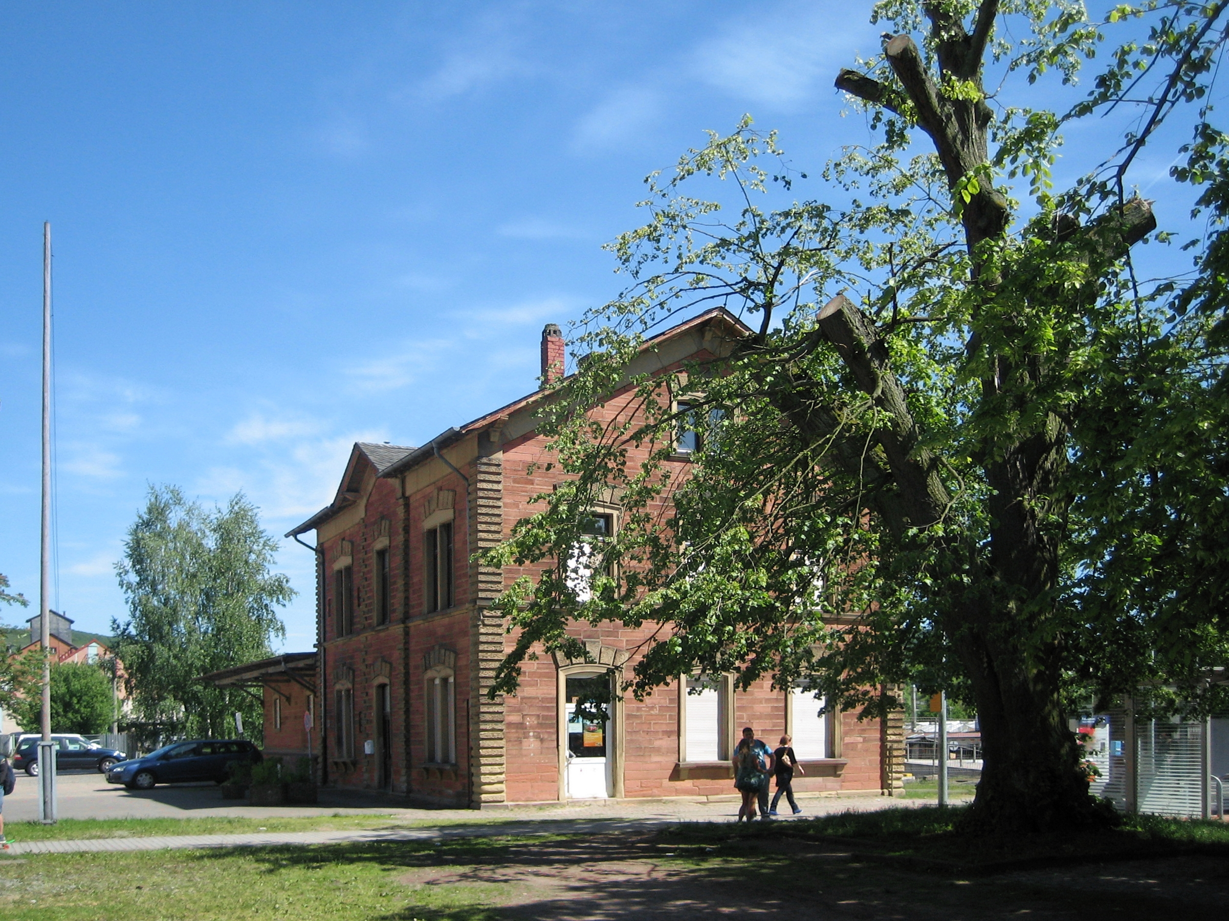 Empfangegebäude des Bahnhof Wolfstein